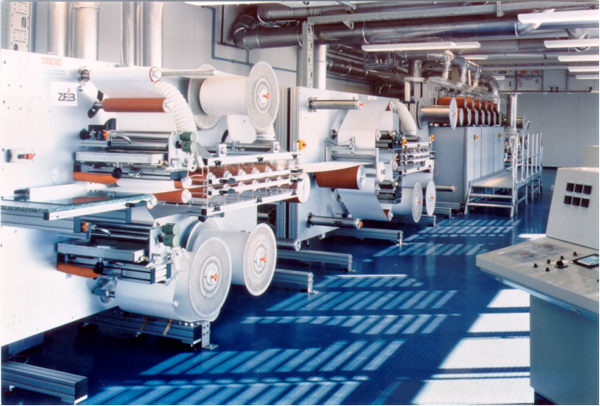 Papierspaltmaschine im Zentrum für Bucherhaltung GmbH, Leipzig